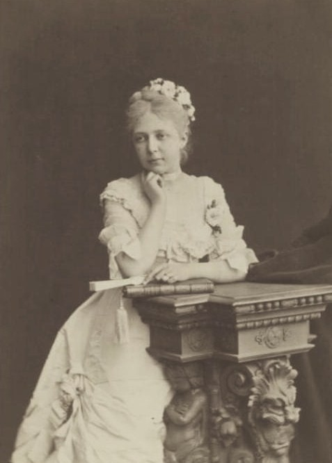 Княгиня Мария Александровна Гагарина, ур. Голицына-Прозоровская (1855—1931)